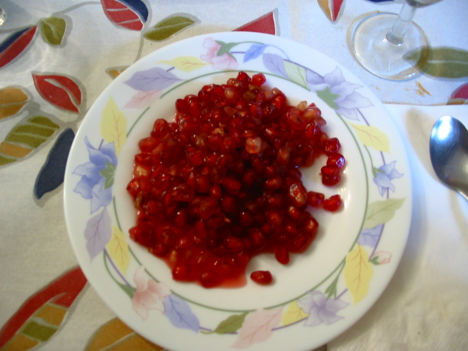 Postre de Granadas